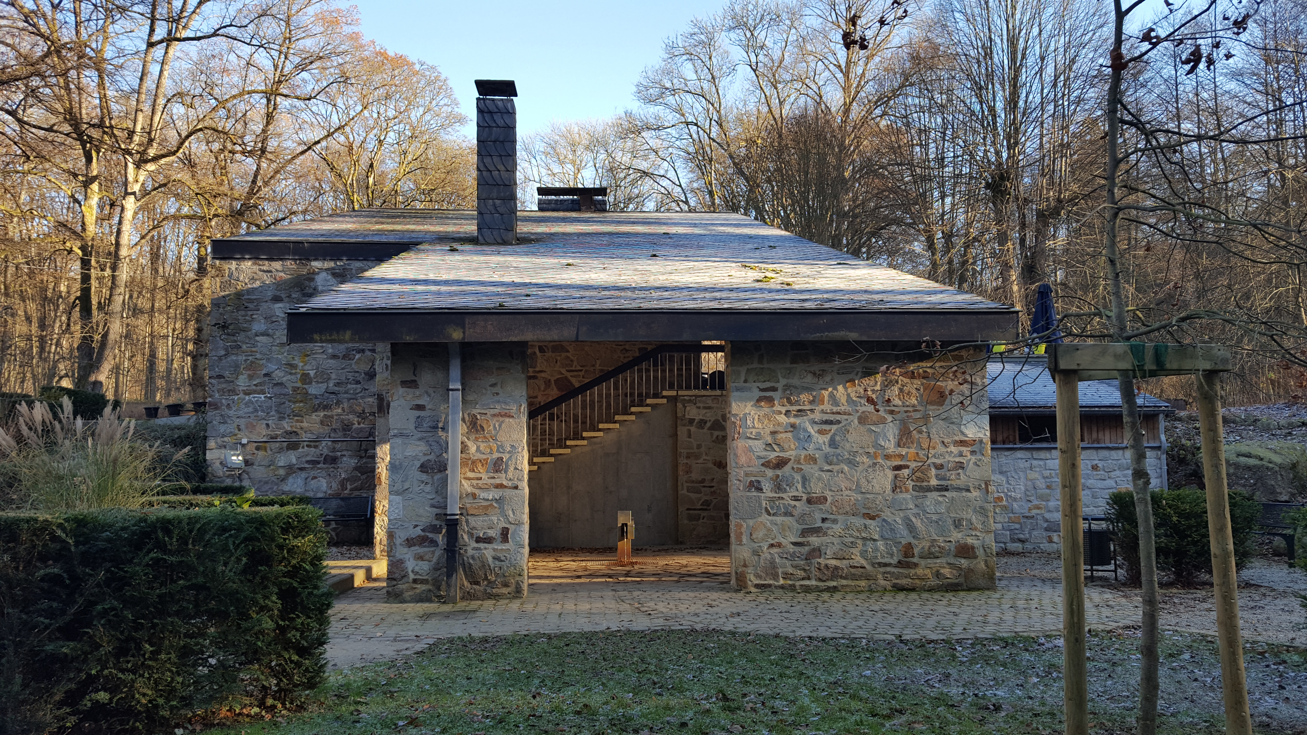 Source de Barisart, Spa, Belgique